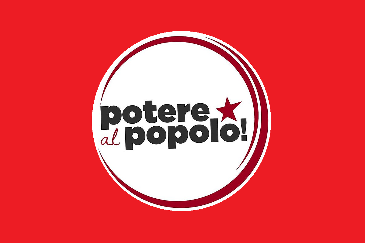 Bandiera del Partito Potere al Popolo, elaborata dalla seguente fotografia